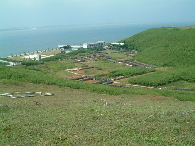 澎湖縣員貝嶼蜂巢田。